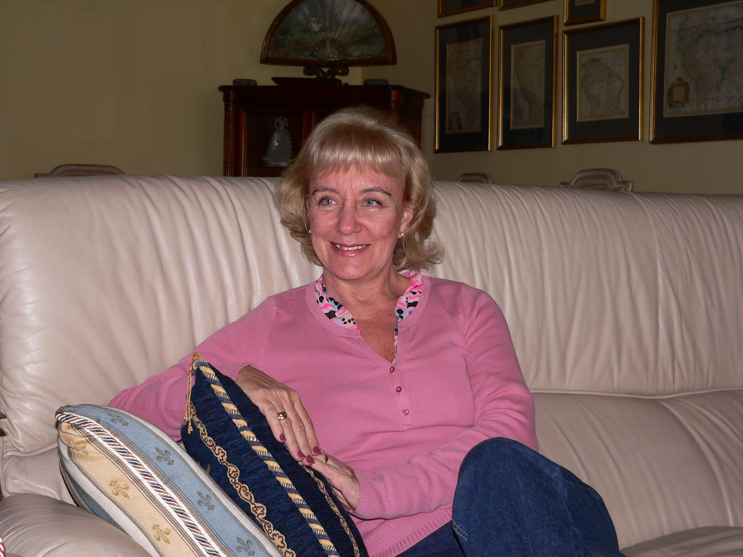 Descripción: Ana María Westphalen Rodríguez País de origen: Perú Nacionalidad: Peruana Profesión : Escultora Lugar y fecha de nacimiento : Lima, 11 de diciembre de 1952 Fotógrafo: © Manuel González Olaechea y Franco , Fecha de la foto : 11 de mayo de 2008